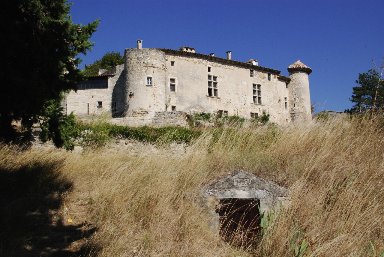 Le Poët-Laval1